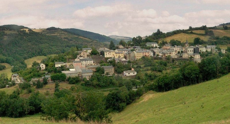 Vue d'ensemble du village prise au sud, sur la D209E (route du col du Bouissou), dans l'épingle à cheveu, à l'entrée du groupes de maison qui fait face au village.